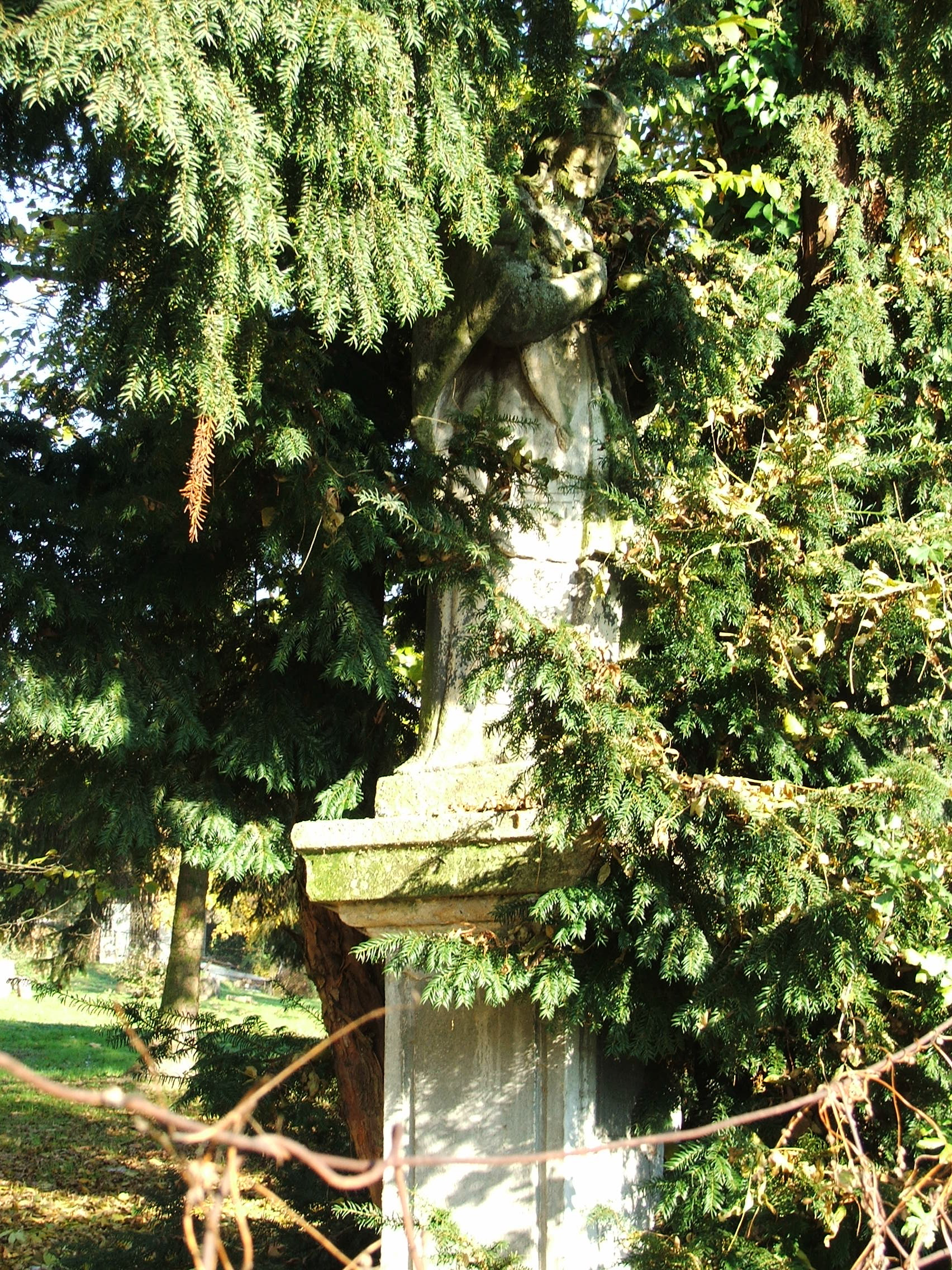 Nepomuki Szent János szobra, Ötvöskónyi This is a photo of a monument in Hungary. Identifier: 8050